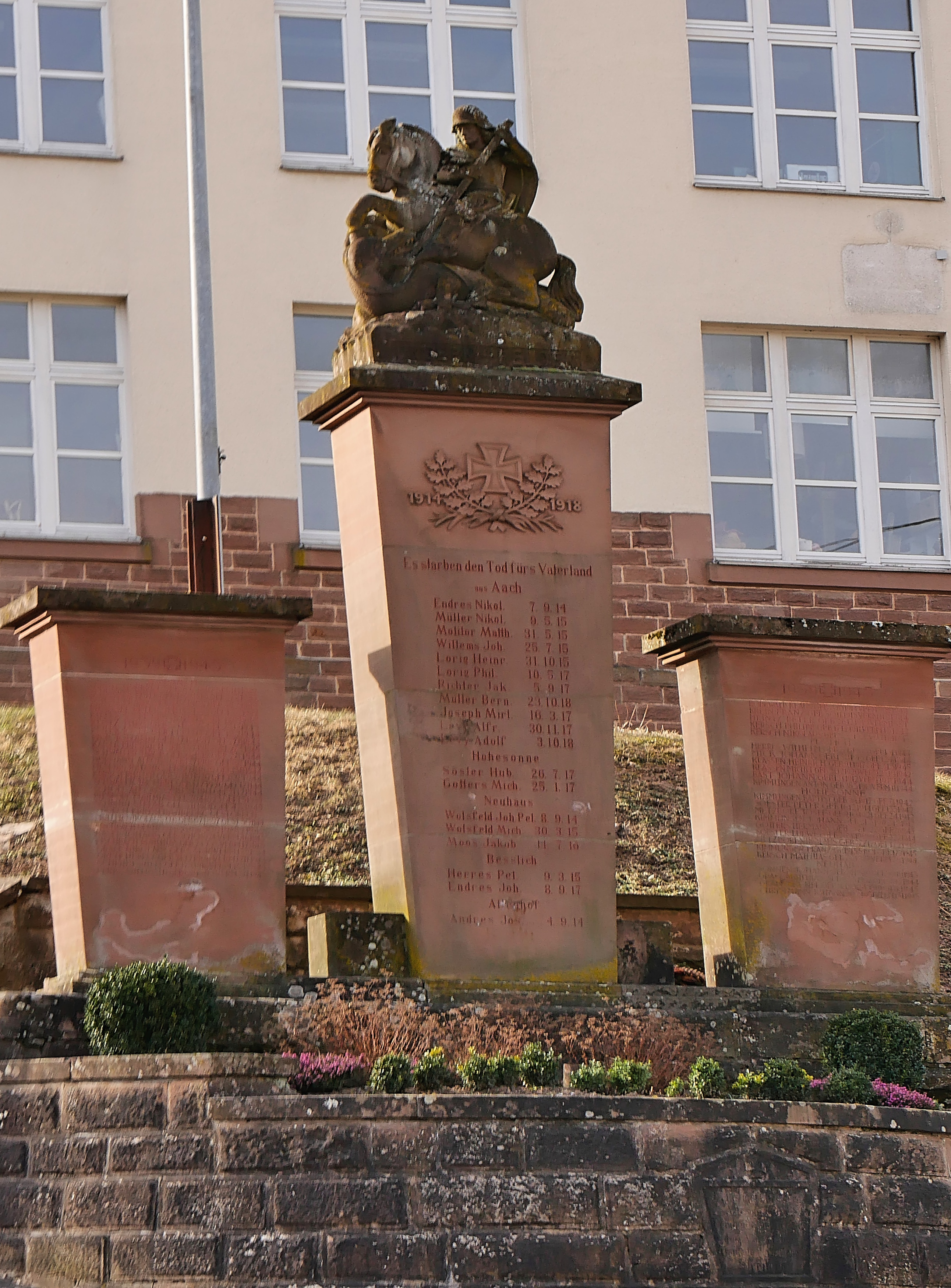 Aach bei Trierː Kriegerdenkmal für den ersten Weltkrieg (innere Stele) und den zweiten Weltkrieg (äußere Stelen)